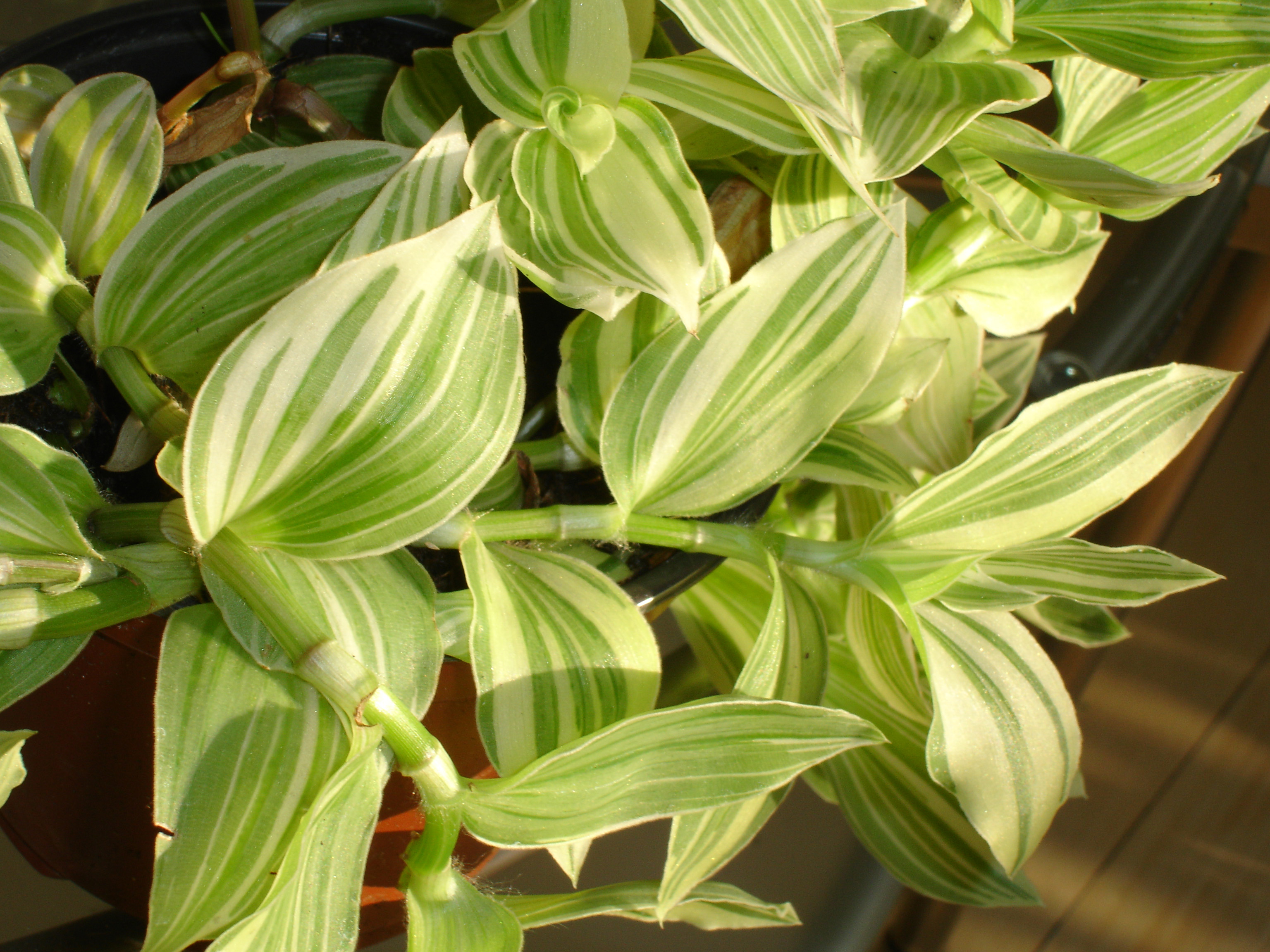 Tradescantia fluminensis, ex Tradescantia albiflora - var. albovittata